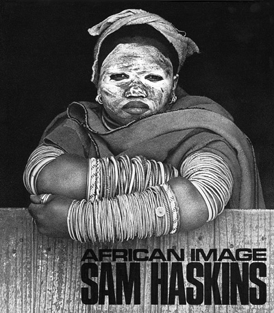 Titelbild des Bildbandes African Image